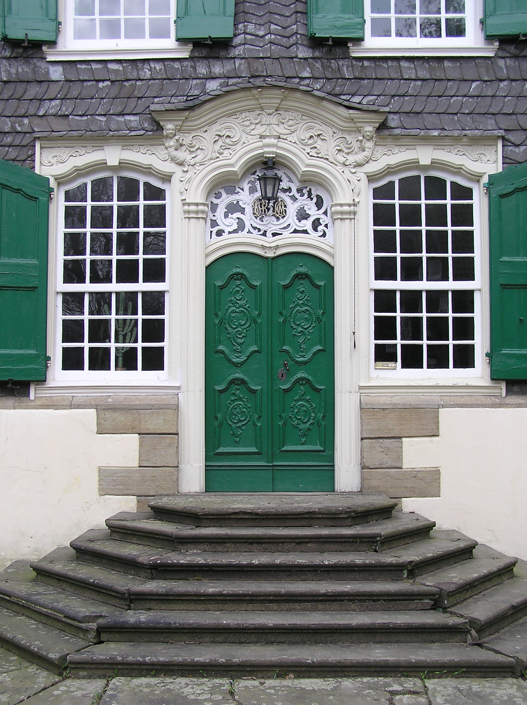 Haus Harkorten - Eingangstür mit geschnitztem Oberlicht